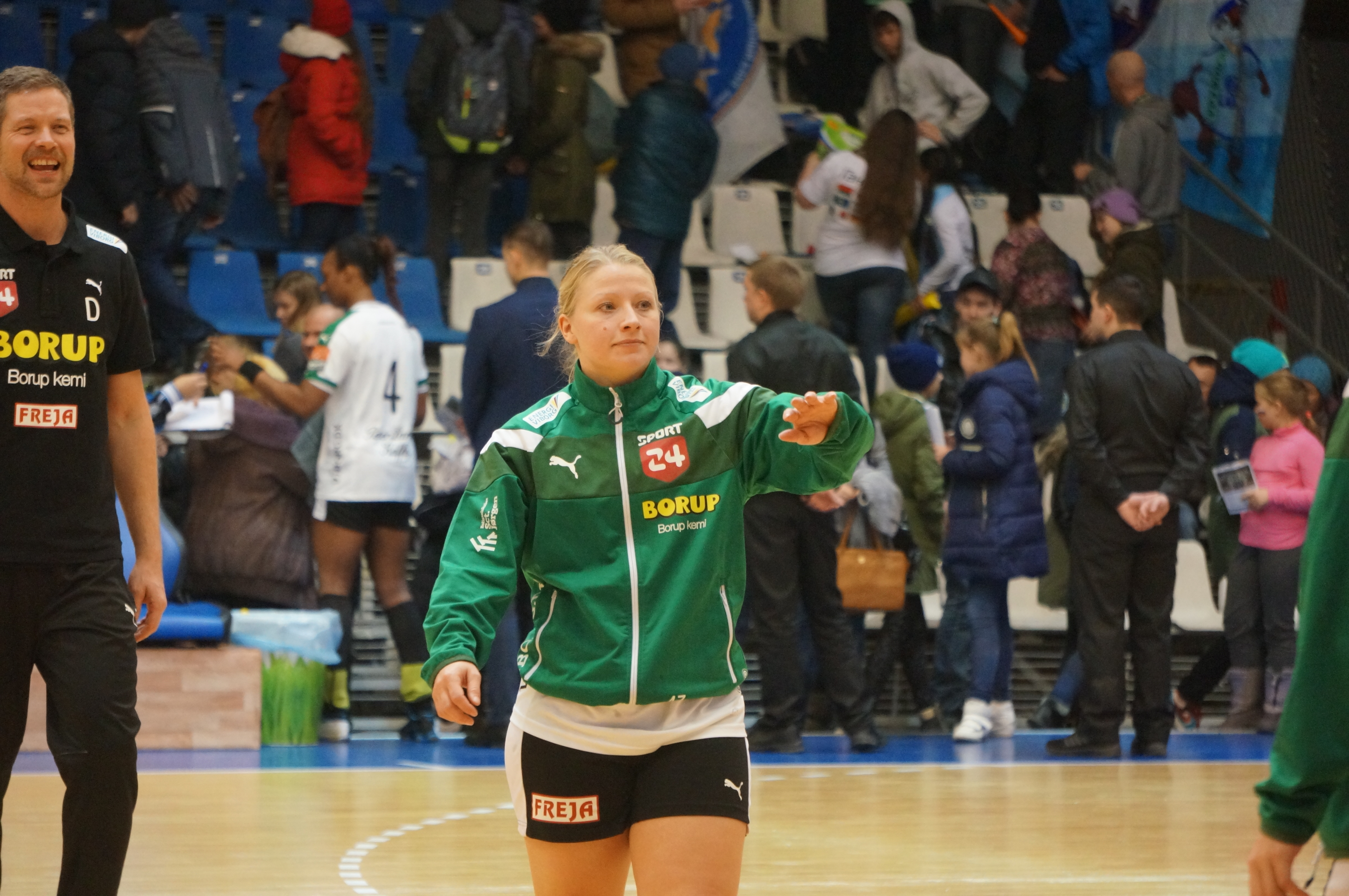 Матч Кубка ЕГФ "Лада" (Тольятти) - "Виборг" (Виборг). Тольятти, Россия, 13 ноября 2016. Игрок ГК "Виборг": Karen Nørgaard Østerballe (47)